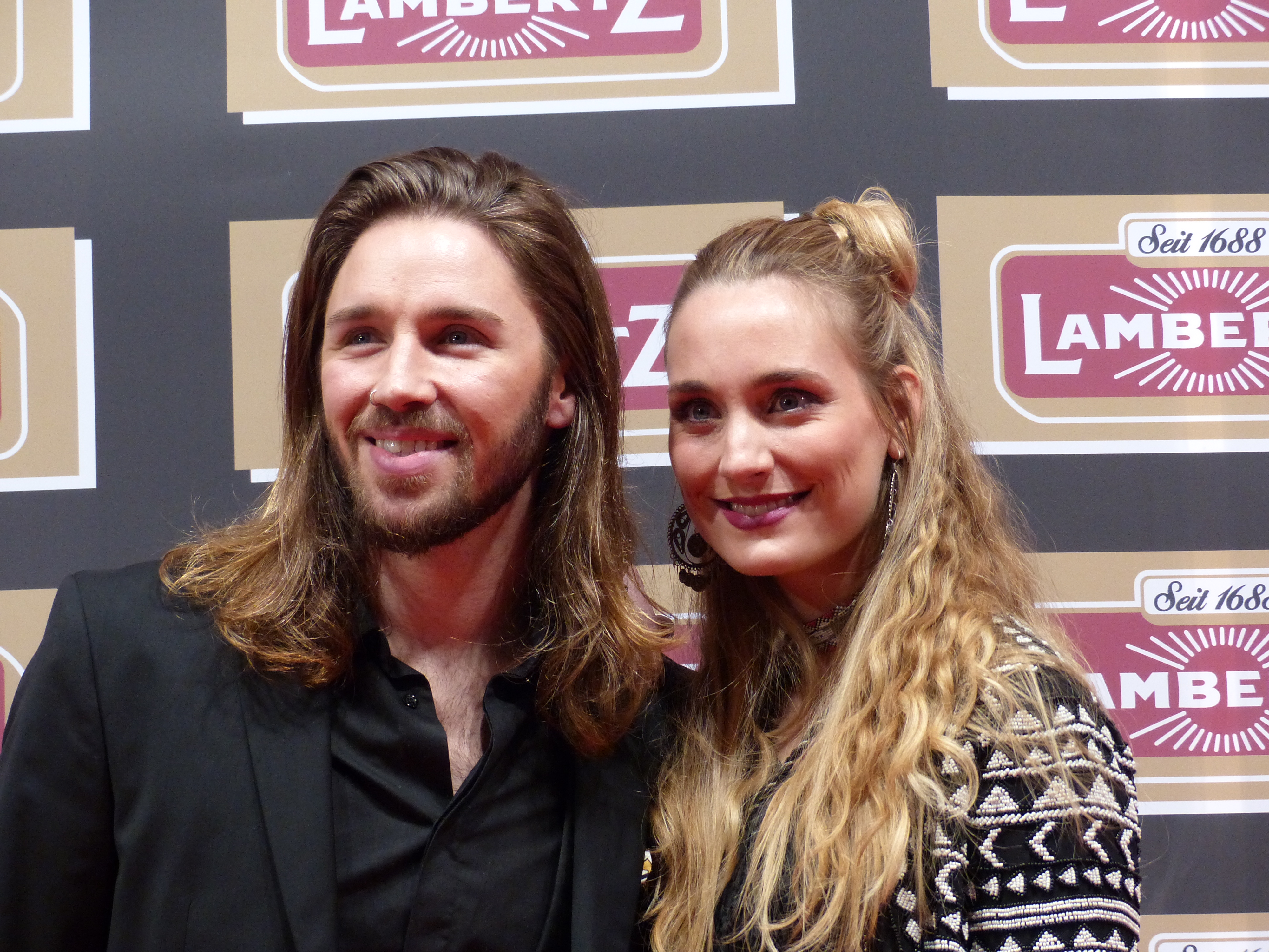 Gil Ofarim und Verena Brock bei der Lambertz Monday Night, im Februar 2016.